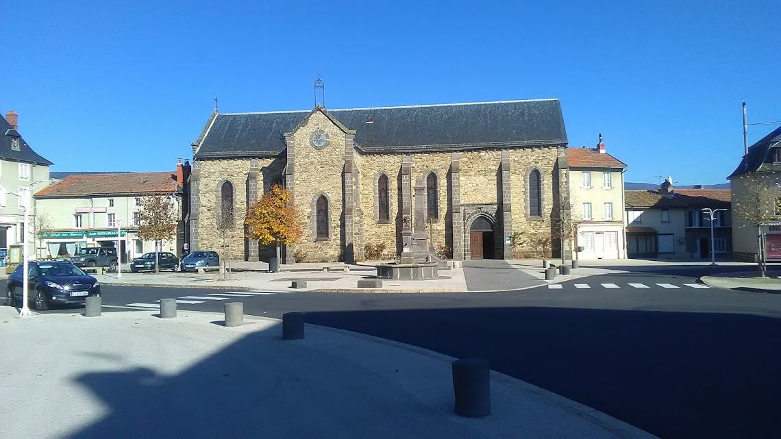 Église (sans clocher) de Ruynes-en-Margeride.